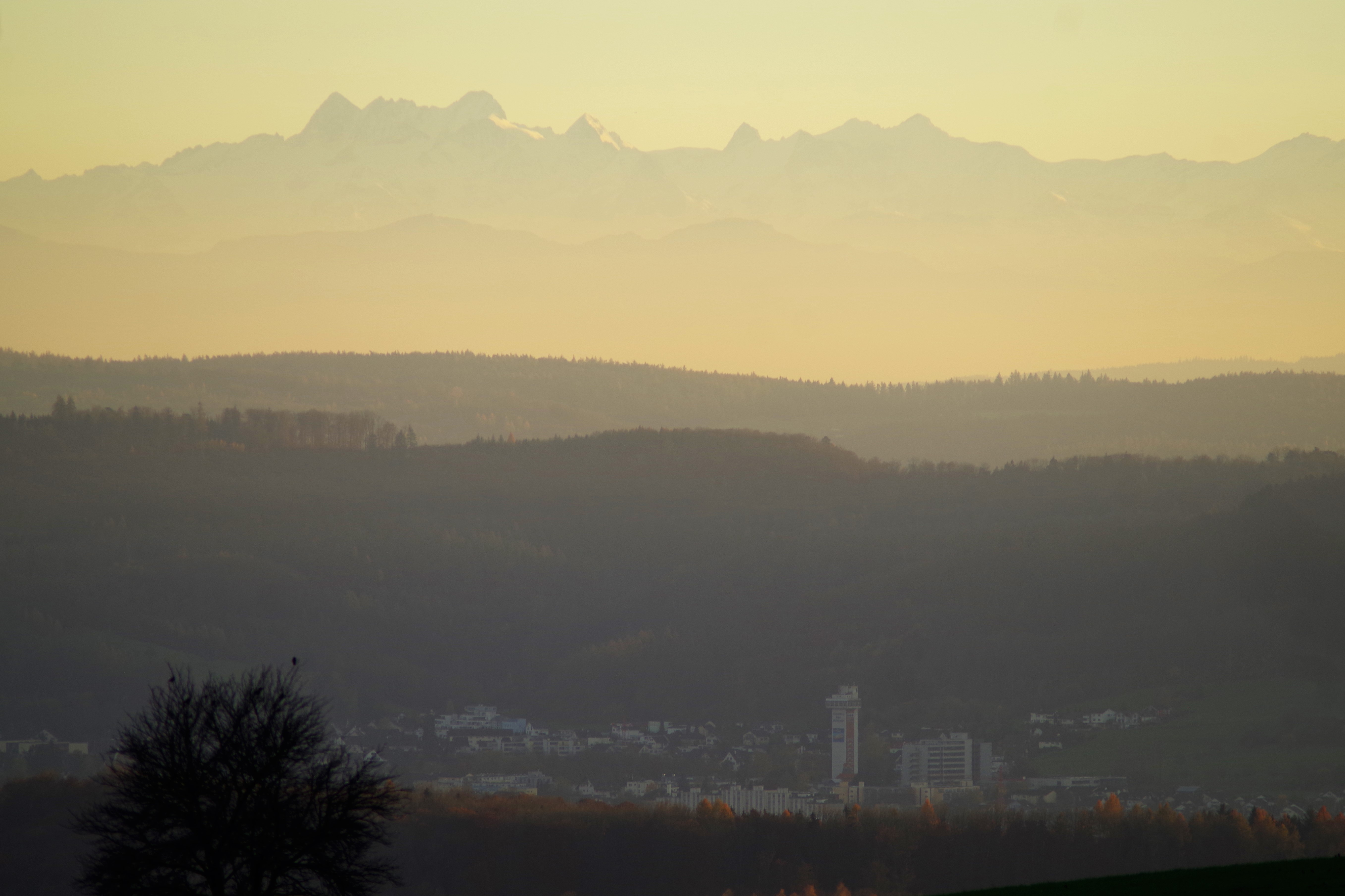 Bad Zurzach vor Eiger, Mönch, Aletschhorn, Jungfrau (4158m), Mittaghorn,Großhorn, Lötschentaler Breithorn und Lauterbrunner Breithorn (von links)